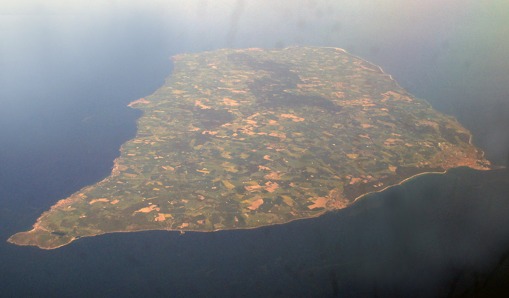 Insel Bornholm (Luftaufnahme)